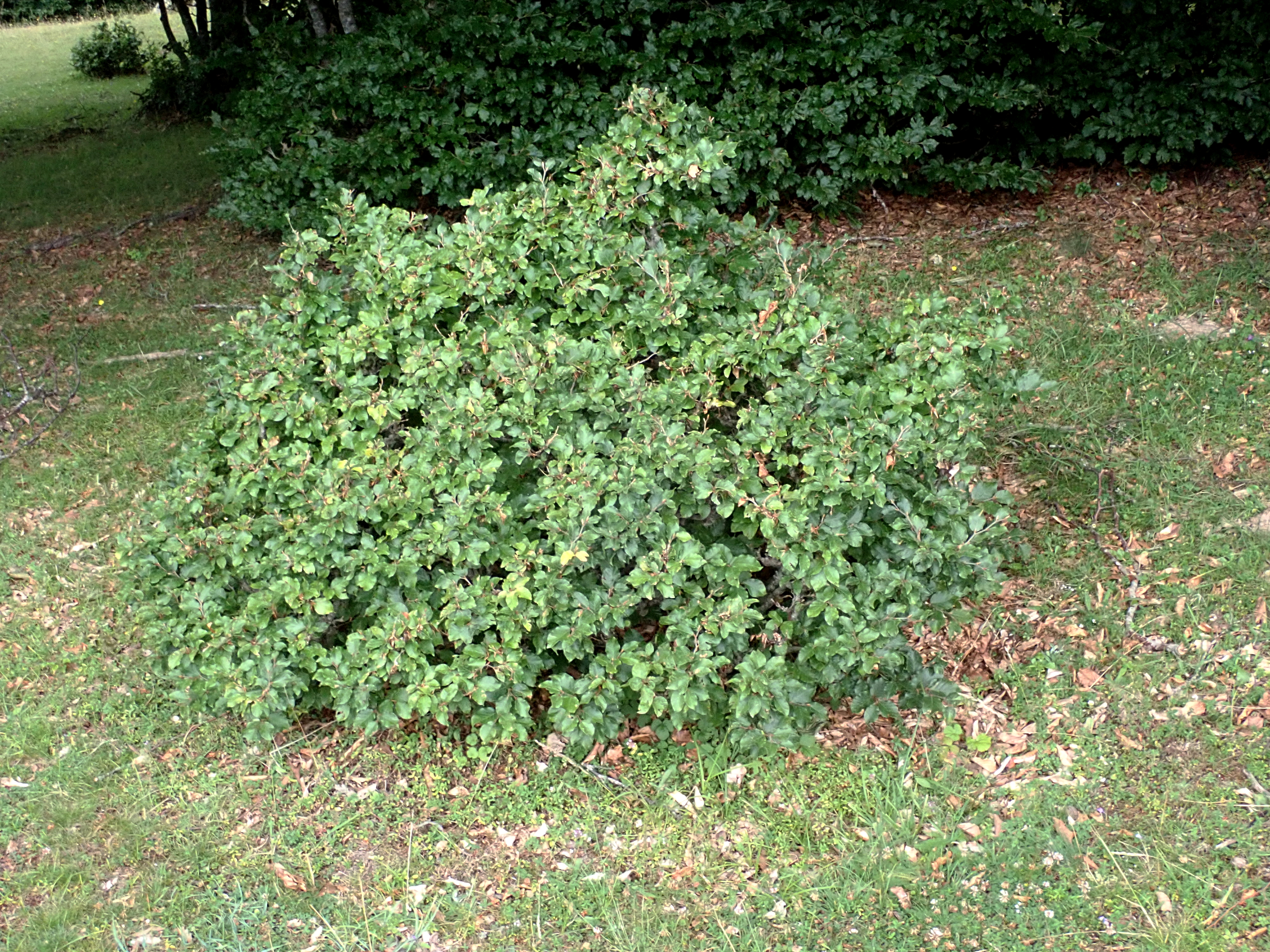 Durch Verbiss zu einem dichten Busch reduzierte kleine Rotbuche, Kuhbusch in Griechenland bei Metsovo